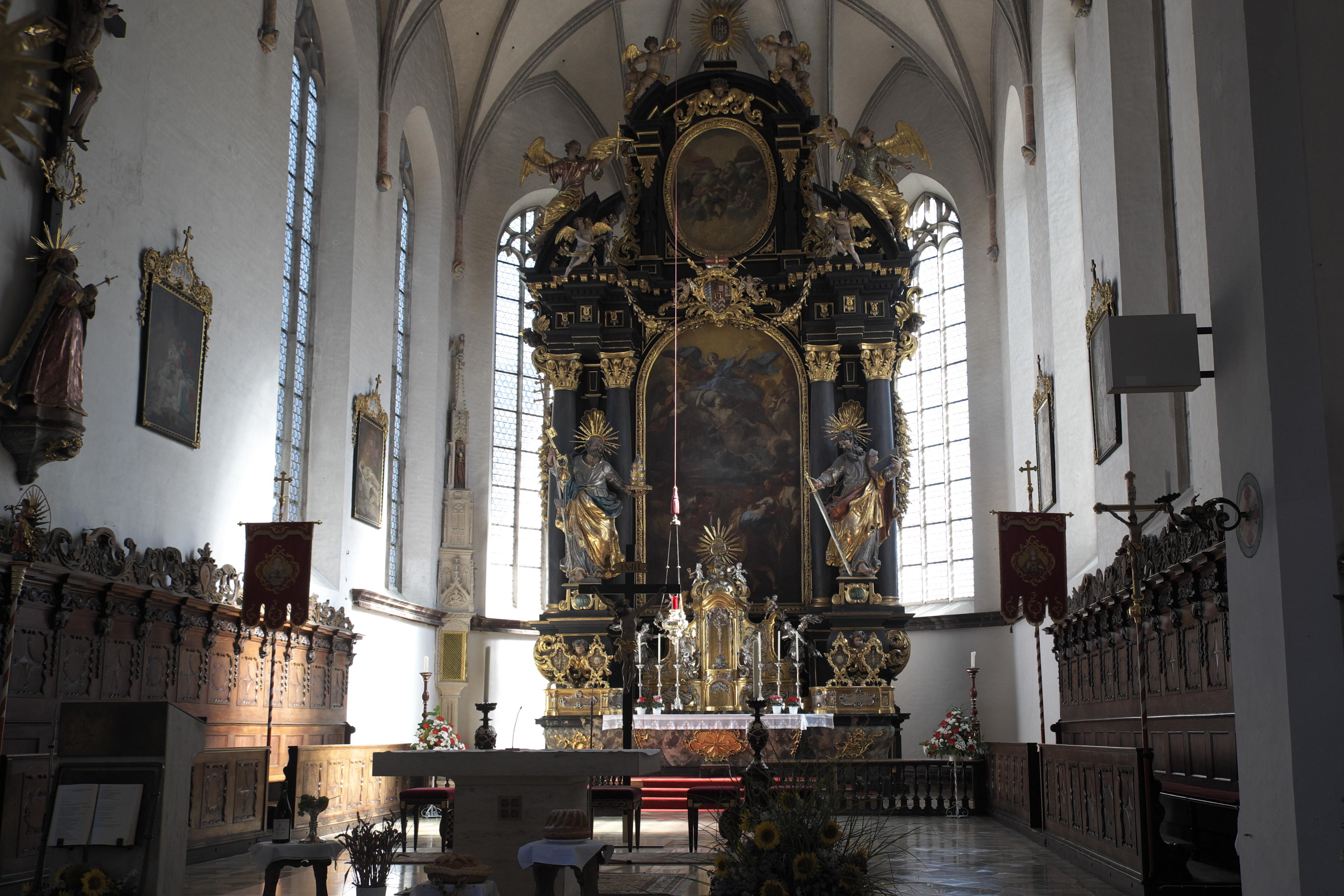 Katholische Stadtpfarrkirche Mariä Himmelfahrt in Höchstädt im Landkreis Dillingen an der Donau (Bayern), Chor